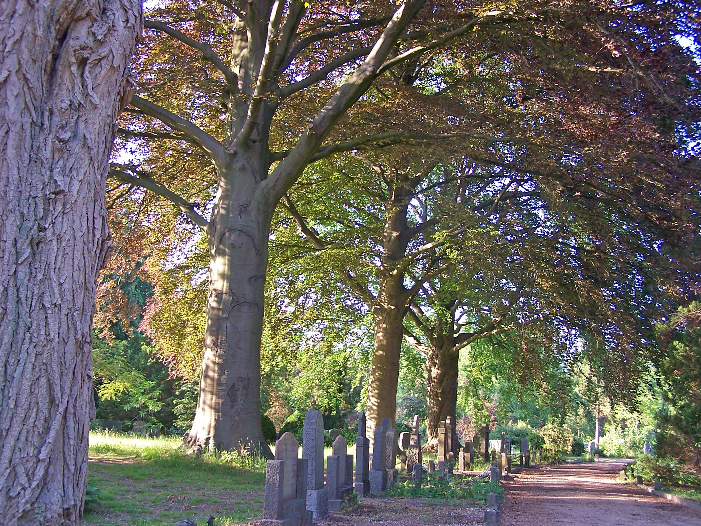 Graves under trees on the Oosterbegraafplaats, a cemetary in Enschede